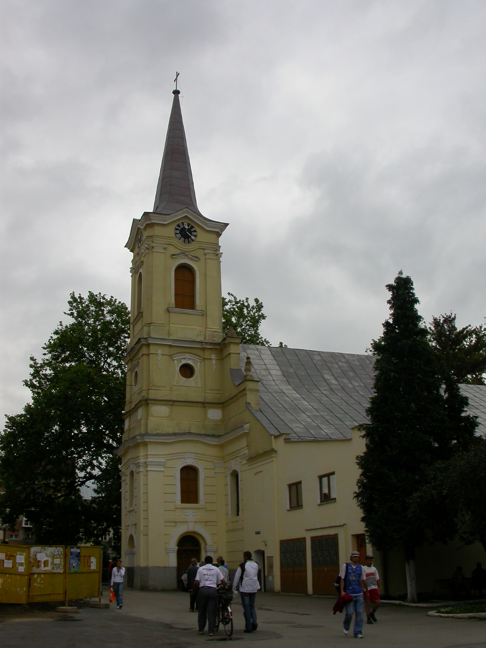 Biserică franciscană, 1725 01